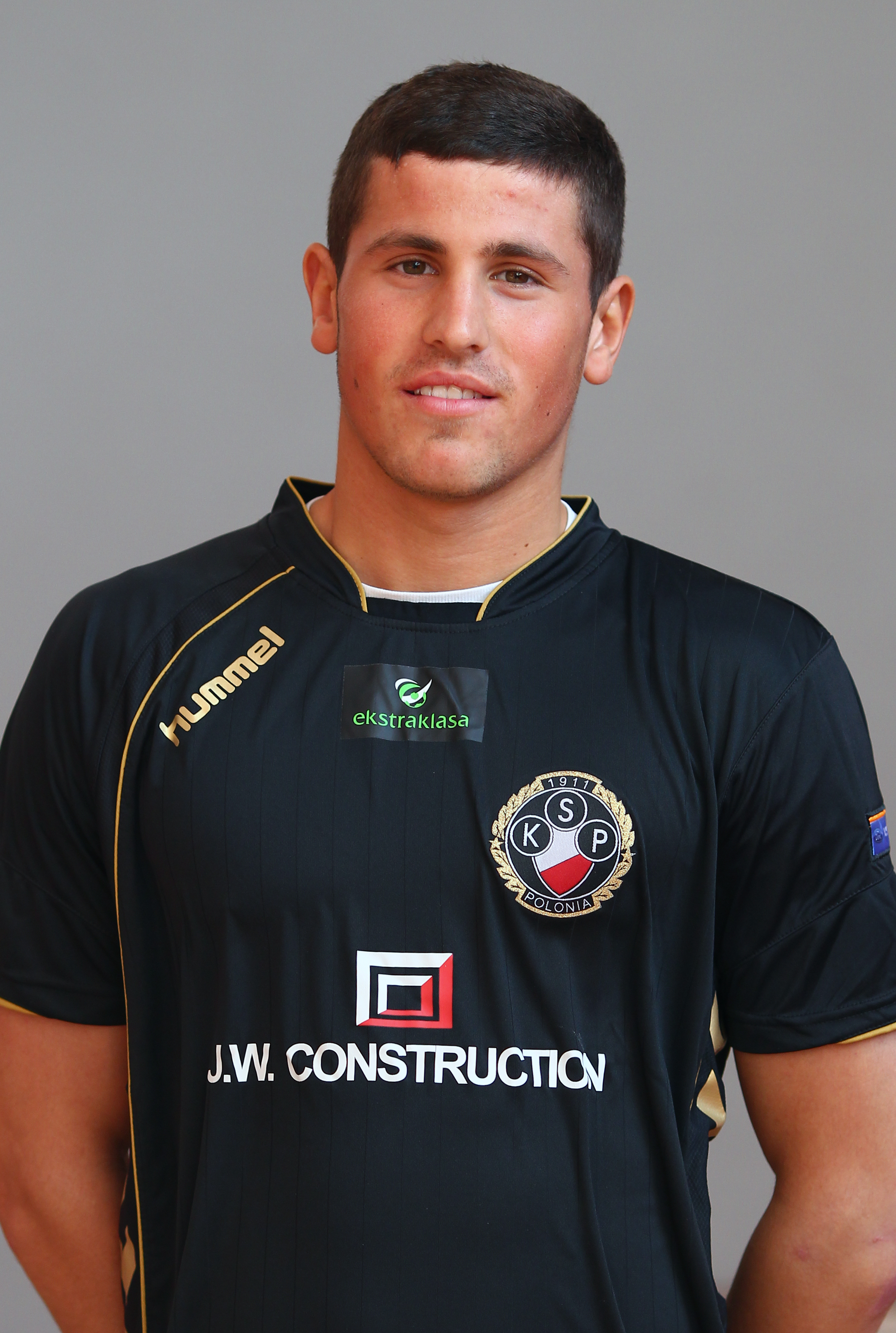 Paweł Wszołek, a player of Polonia Warszawa (2011)